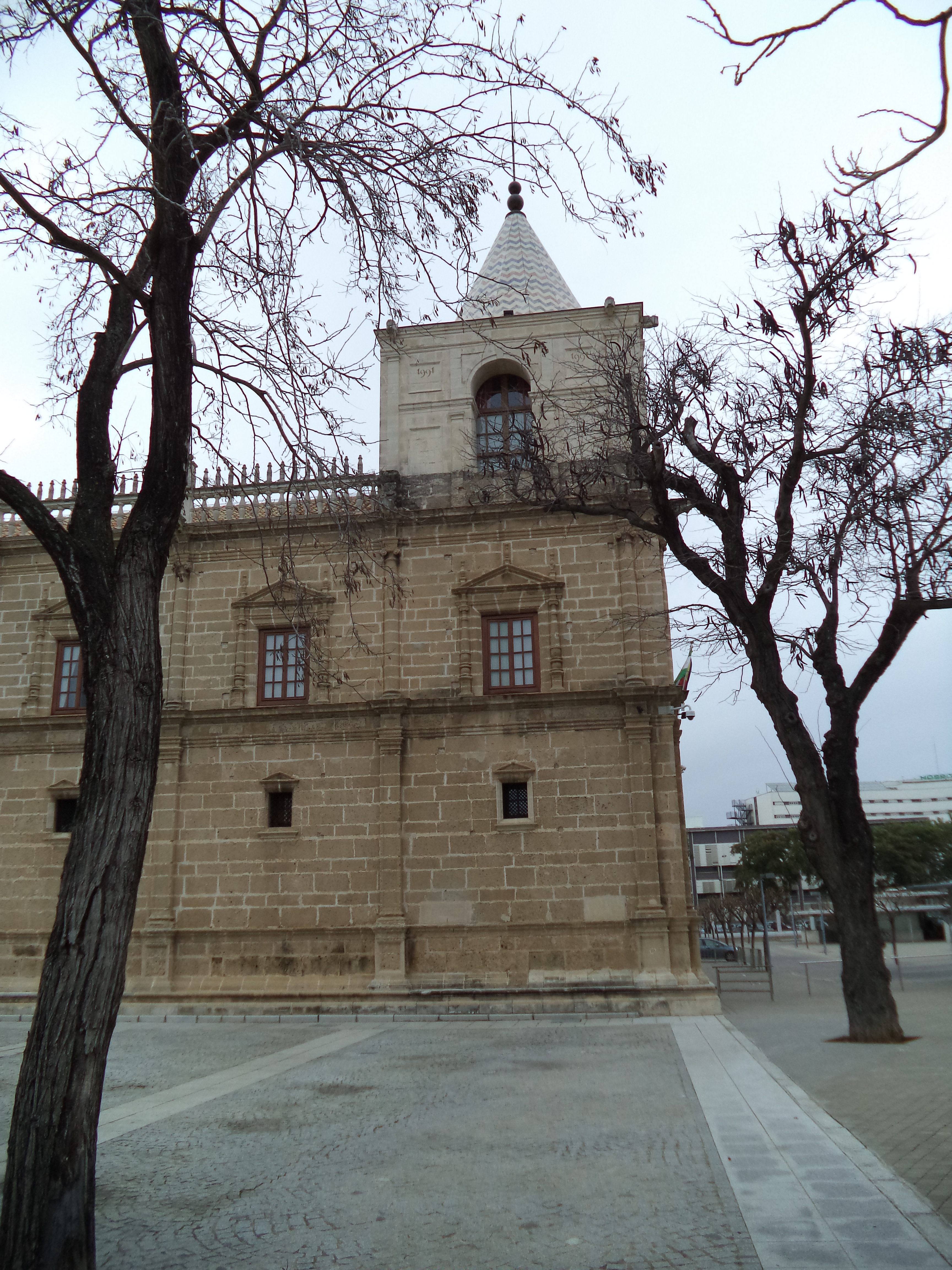 Torre en una esquina Sur-Oeste del Parlamento de Andalucía, antiguo Hospital de las Cinco Llagas